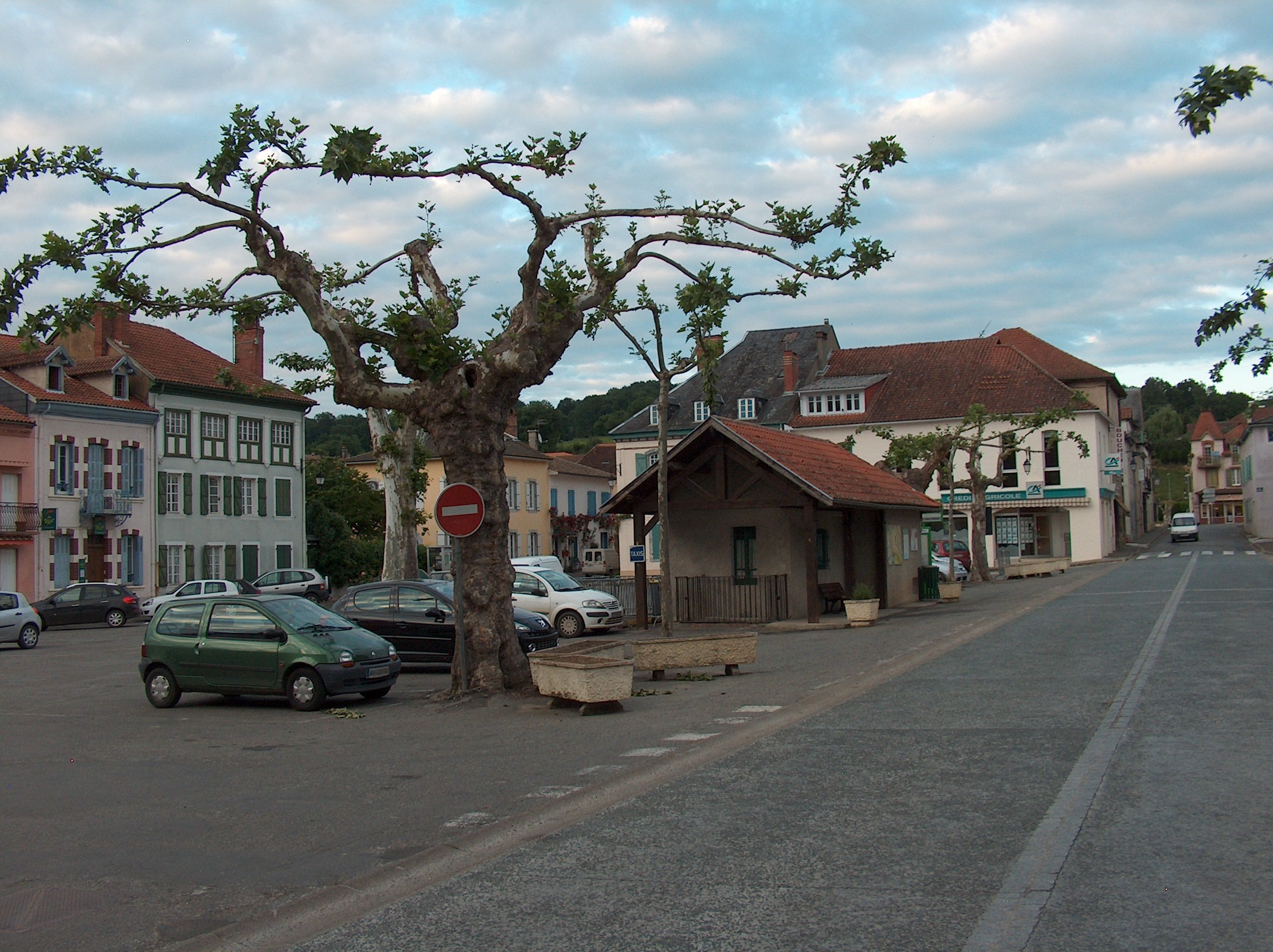 Le côté nord de la place d'Astarac, à Tournay (65190 France). Vu depuis la route qui traverse le village.